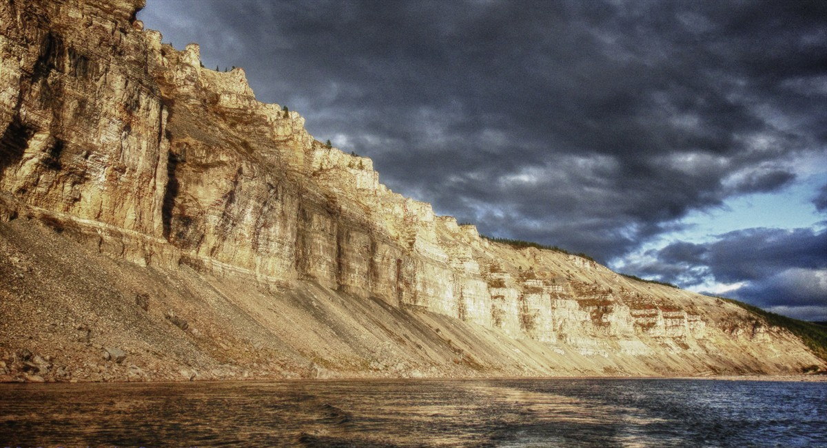 Сфинксы...